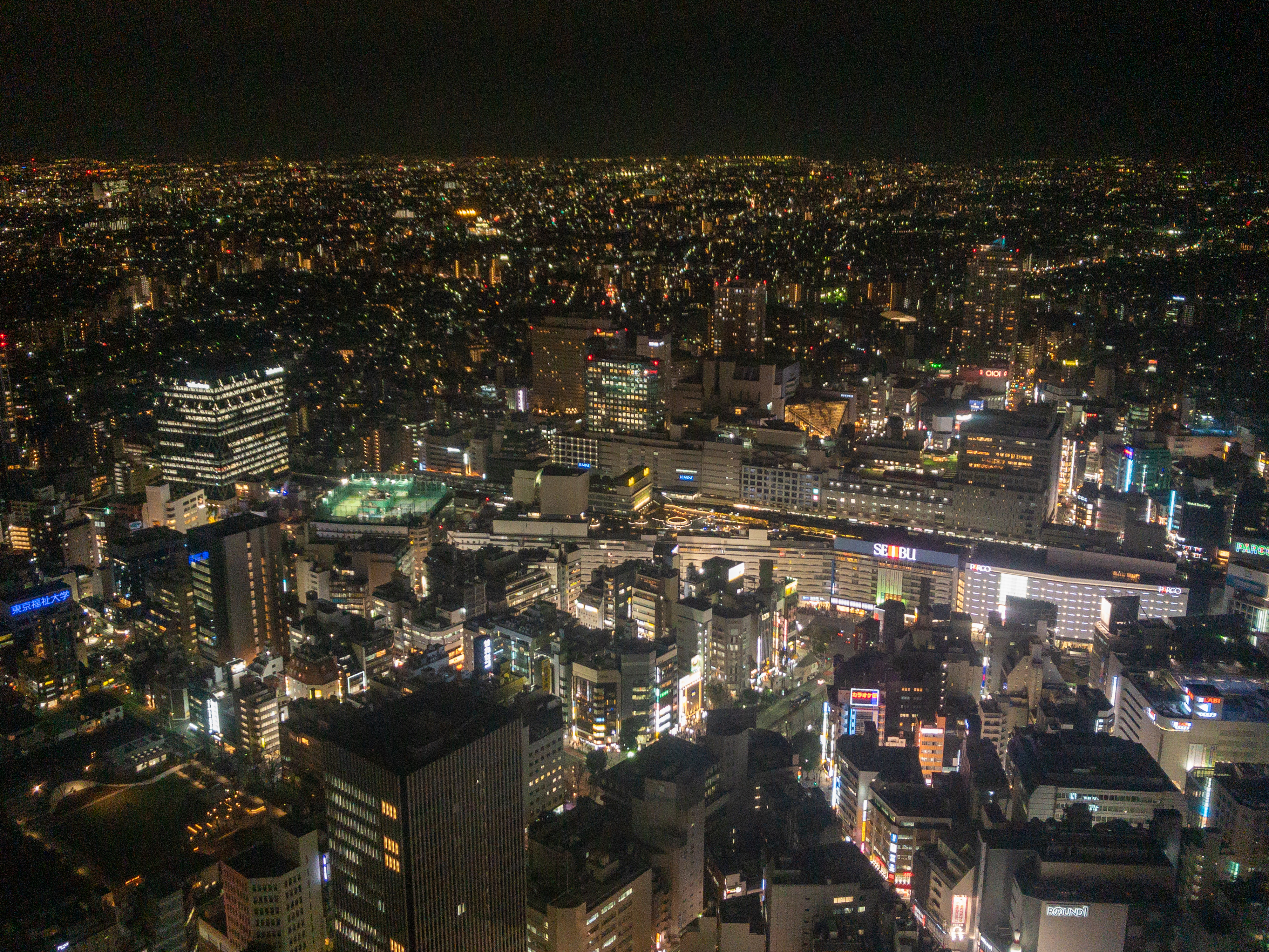 サンシャイン60から見た池袋駅東口側の夜景。